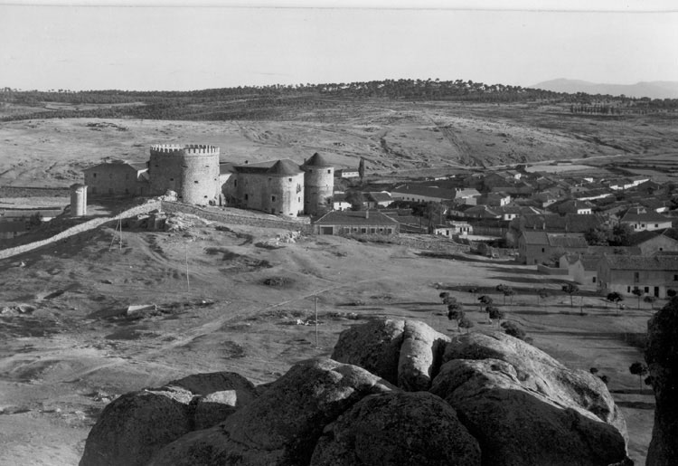 Castillo - Las Navas del Marqués (Ávila) - Ediciones Vistabella. Madrid. Texto en reverso - Postal 150 x 100 B/N